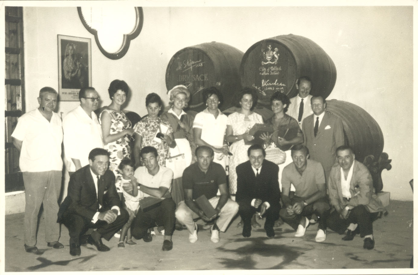 Alfredo Di Stefano, José Santamaría e Isidro Sánchez García Figueras en el Salon Don Guido de las Bodegas Williams & Humbert Ltd., de Jerez de la Frontera, durante su visita junto con los directivos de la Empresa, sus esposas y la "Sherry Girl" (famosa en el mundo entero por aquellas fechas por ser la mascota de la Empresa)